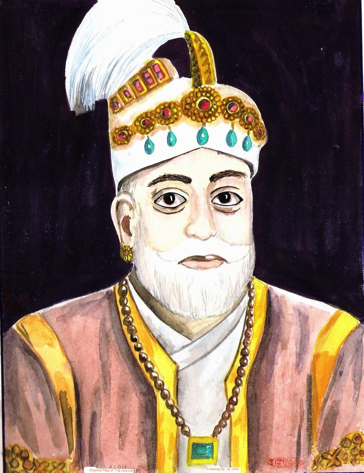 Dharma Raja Travancore kingdom Owner Jiji john , Vettinilkunnathil House,Mallassery, Pathanamthitta, Kerala, India Drawing by jiji john